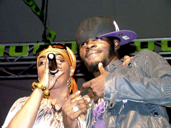 l'artiste Dj Arafat